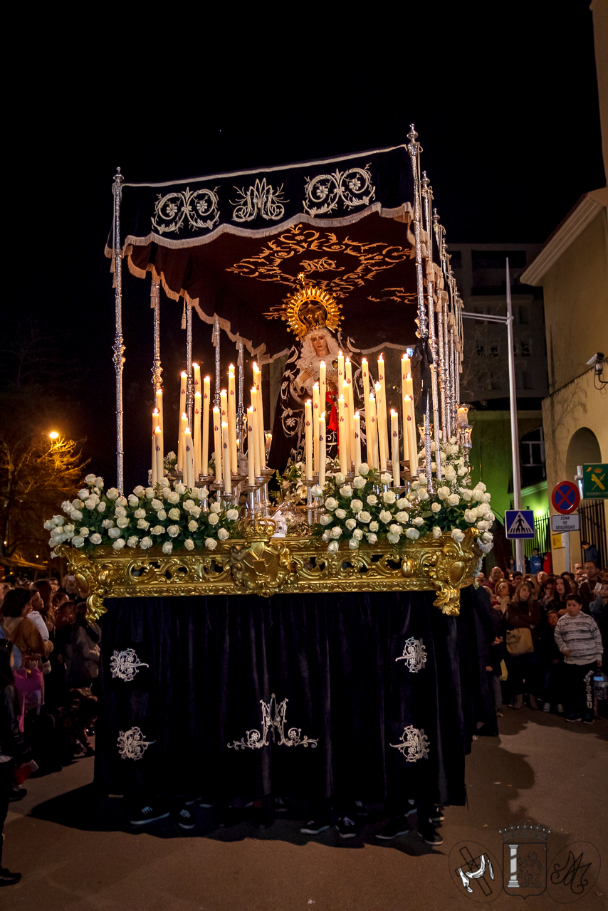 Mayor Dolor Badajoz 2016